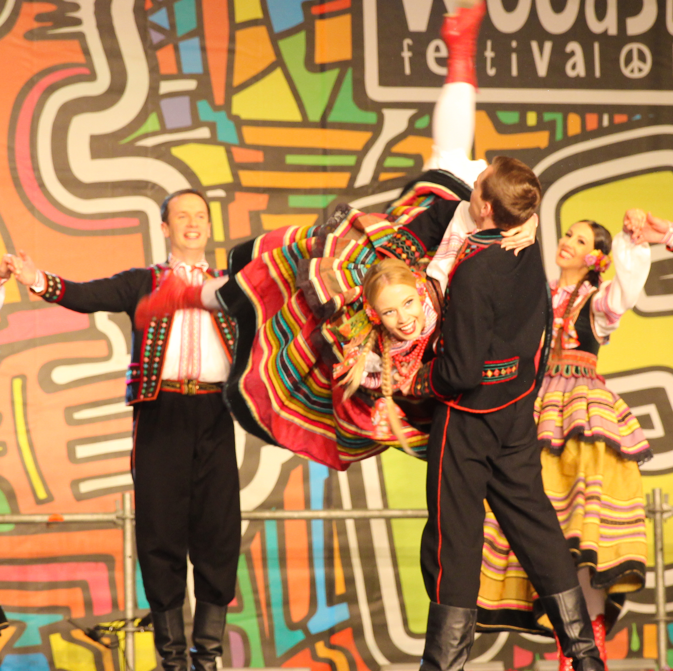 Państwowy Zespół Ludowy Pieśni i Tańca „Mazowsze” na Przystanku Woodstock 2013